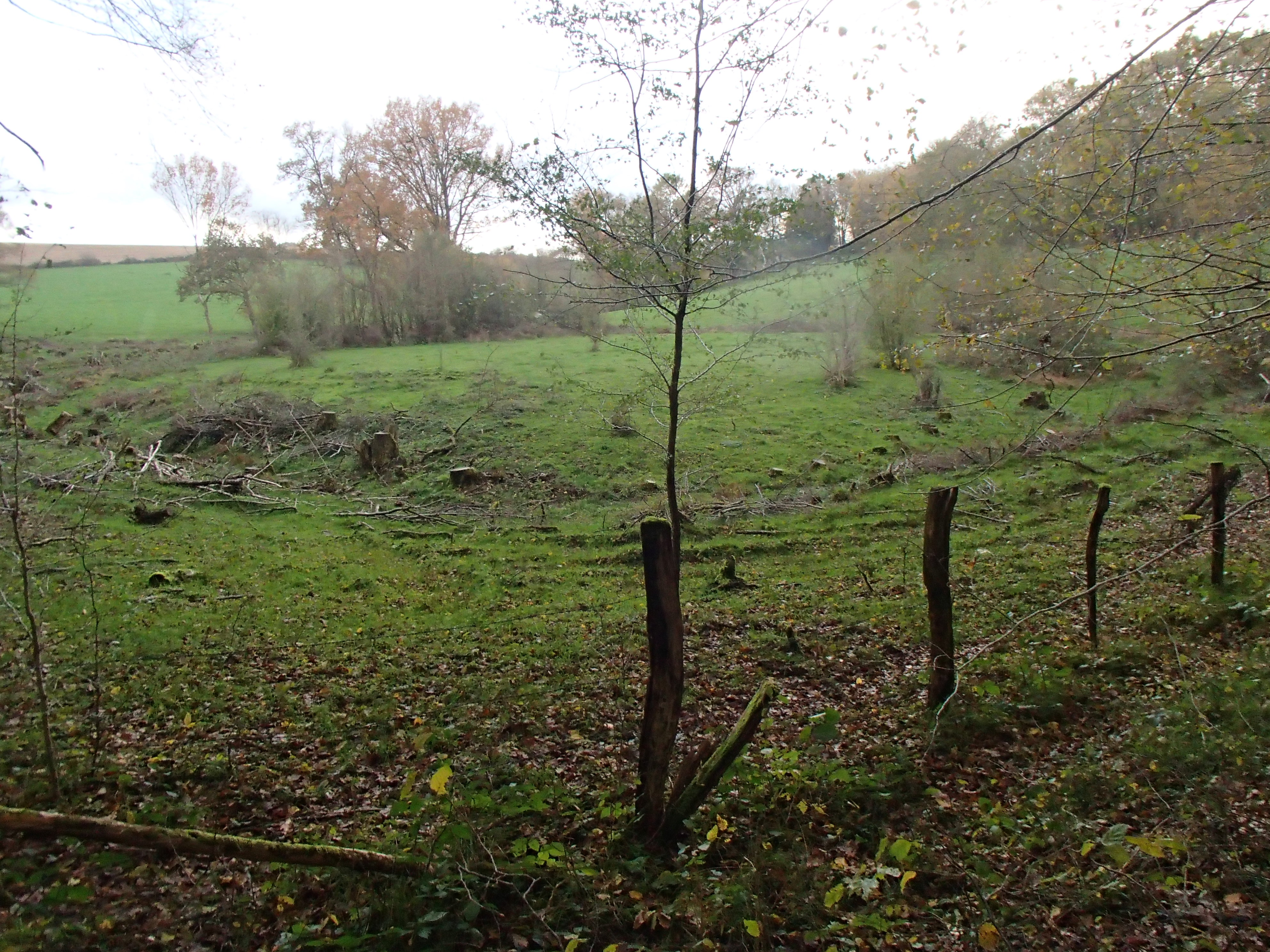 Motte